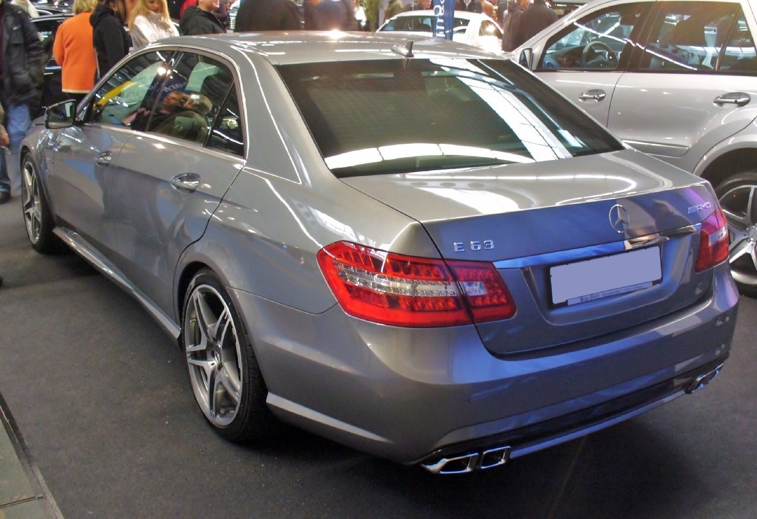 Mercedes-Benz E 65 AMG